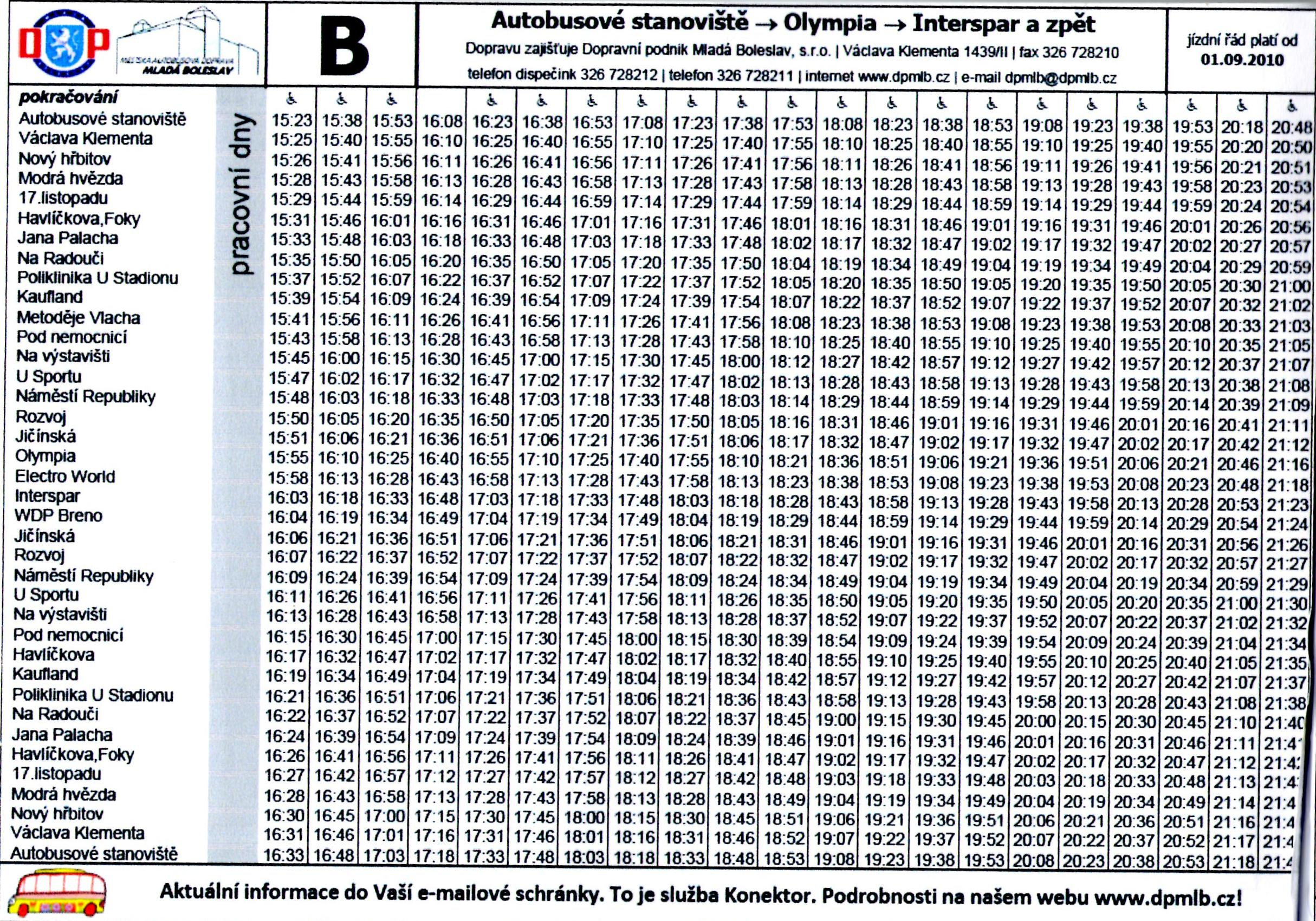 Ukázka z jízdního řádu Dopravního podniku Mladá Boleslav, s.r.o. vydaného v roce 2010.